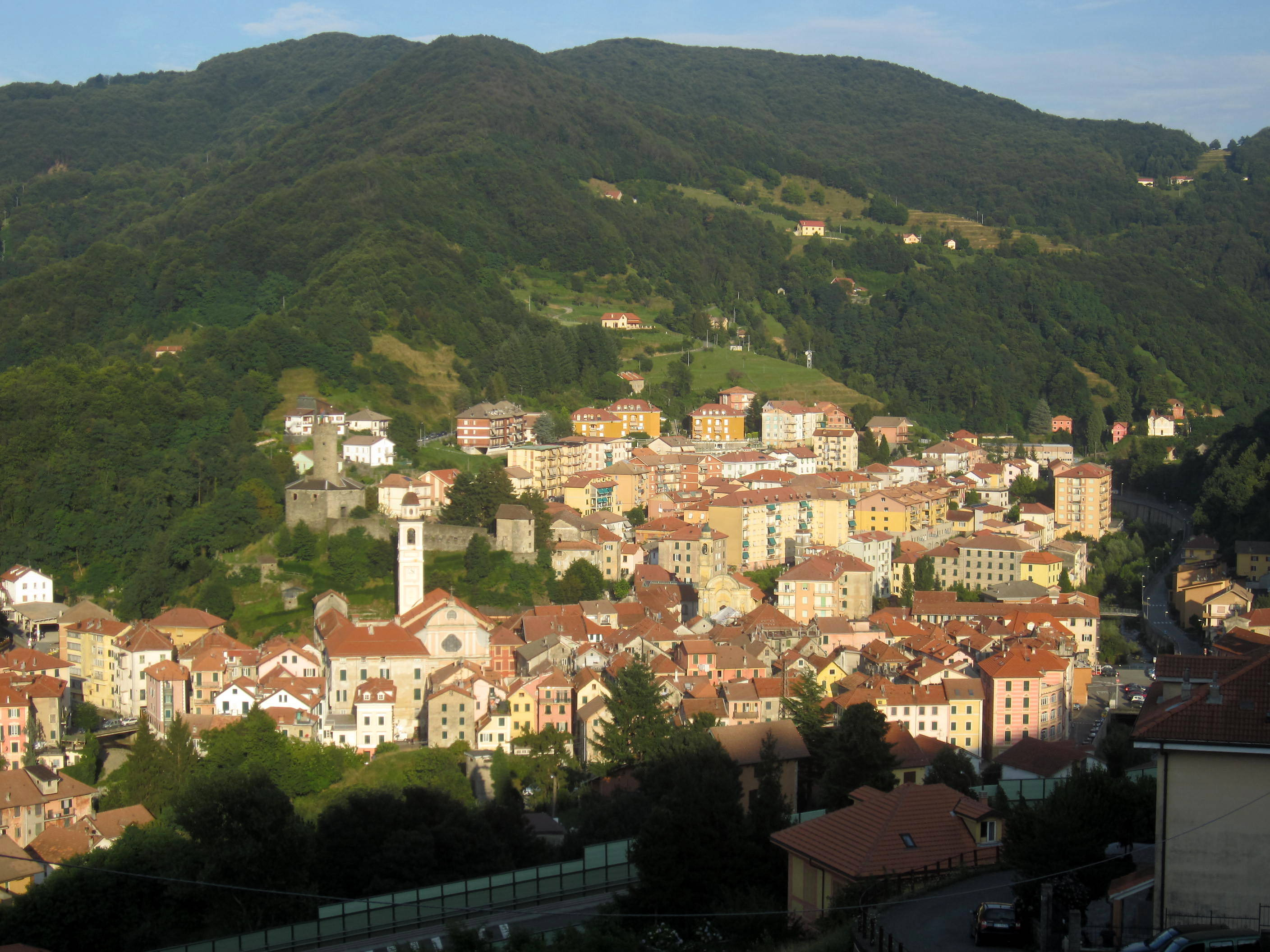 Panorama di Campo Ligure